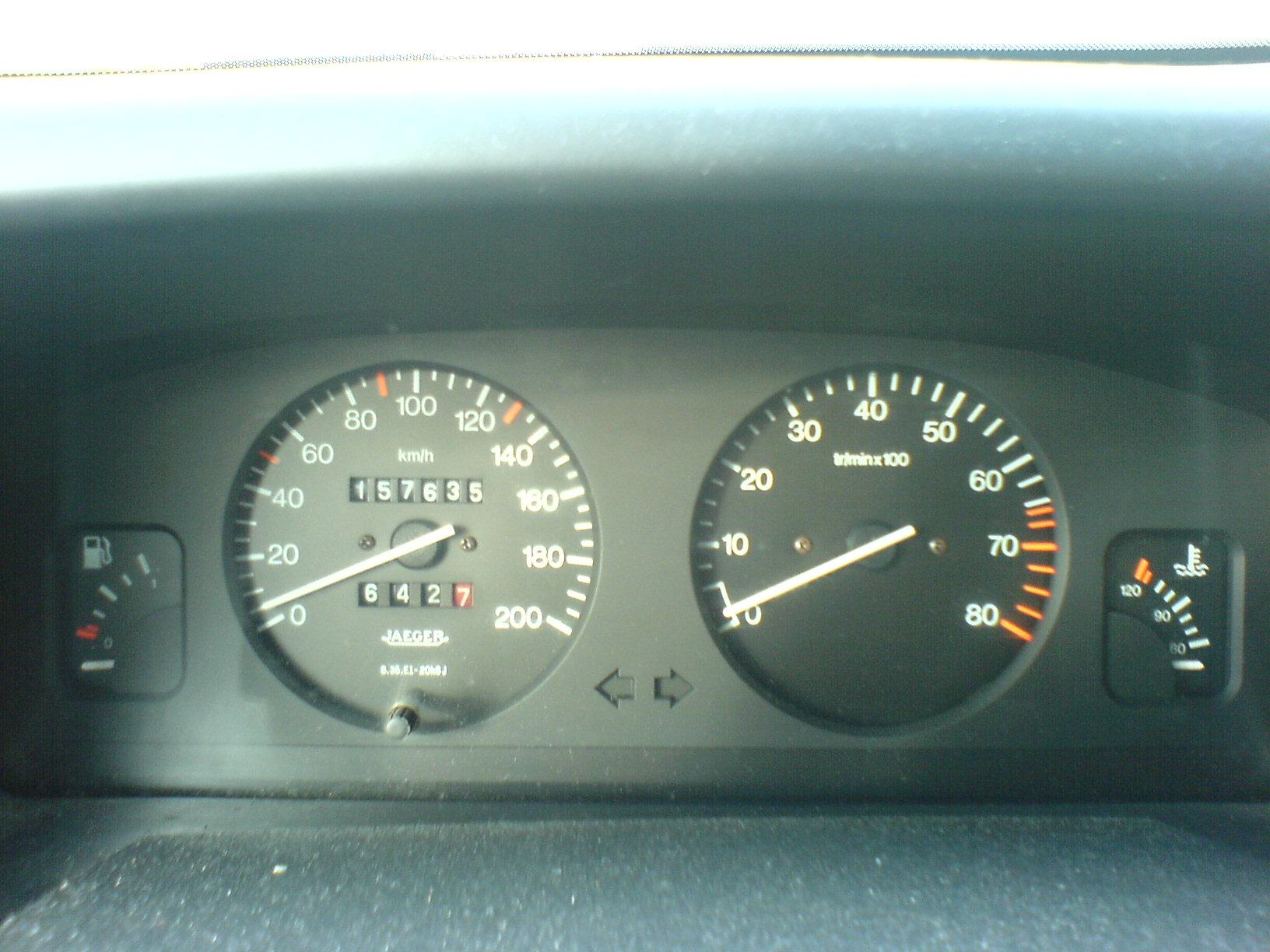 car, citroen zx cockpit